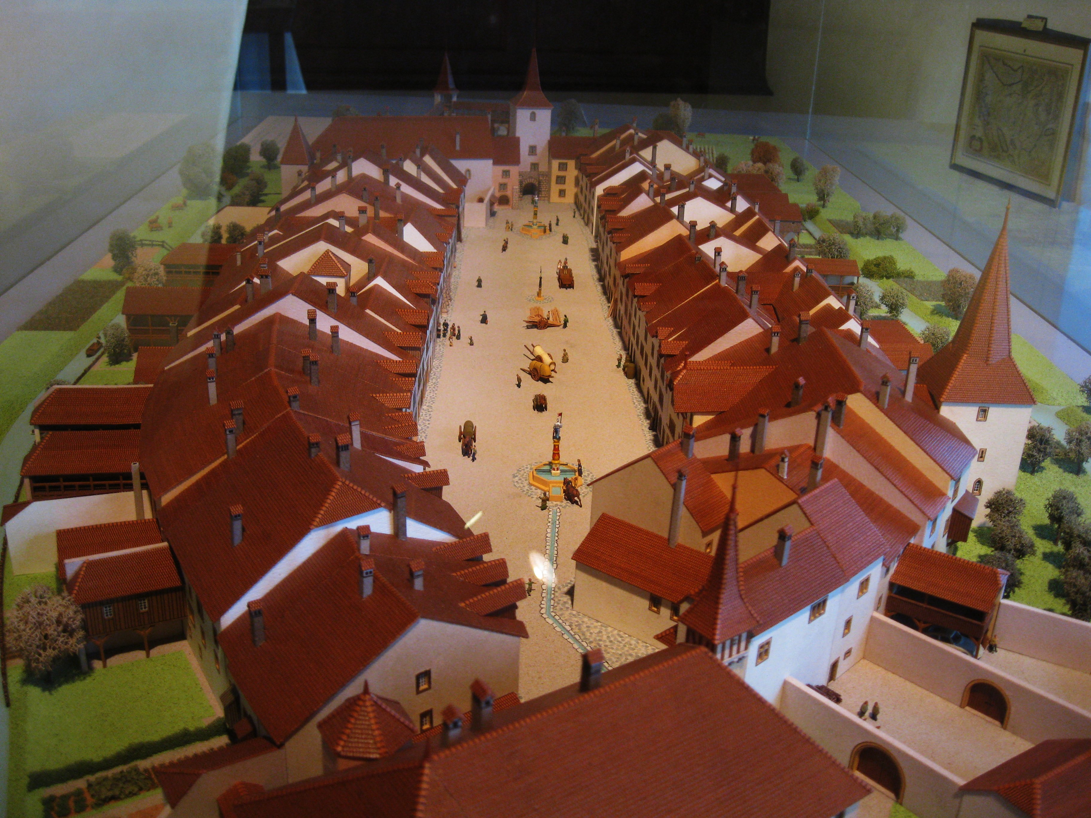 Modell im Museum Landeron